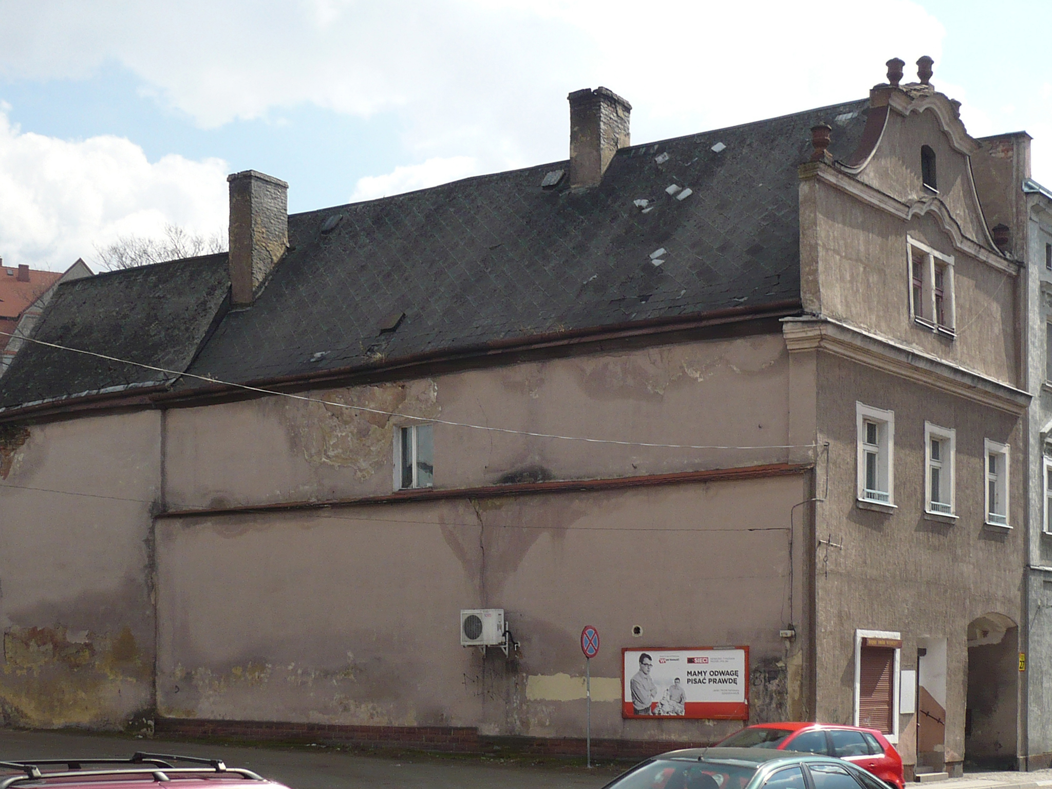 Nowa Ruda, ul. Piastów 27 - dom, XVIII w., przebud. w XX w.